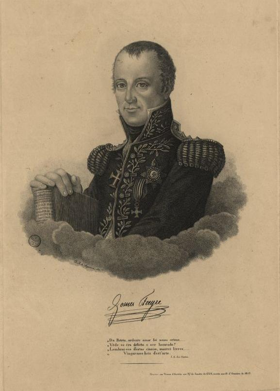 Der portugisische General und Verschwörer Gomes Freire de Andrade (1757-1817)